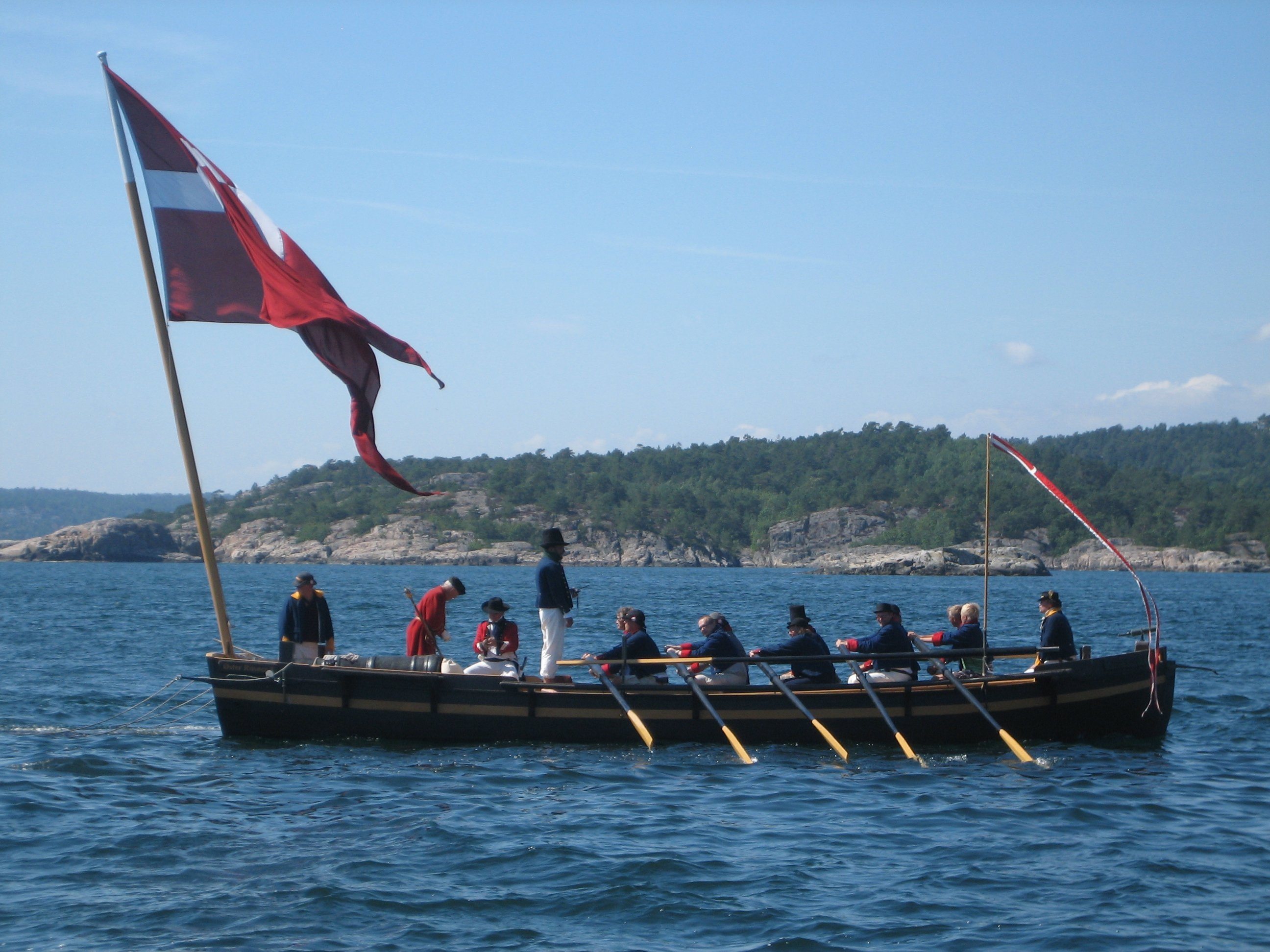 Øster-Riisøer 3